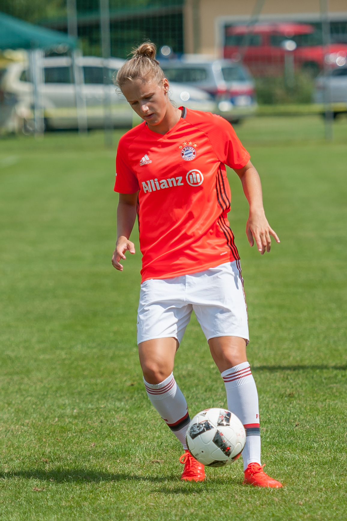 Testspiel SKN St. Pölten vs FC Bayern München am 23. Juli 2016 in Spillern. Bild zeigt Vivianne Miedema (Bayern Muenchen).